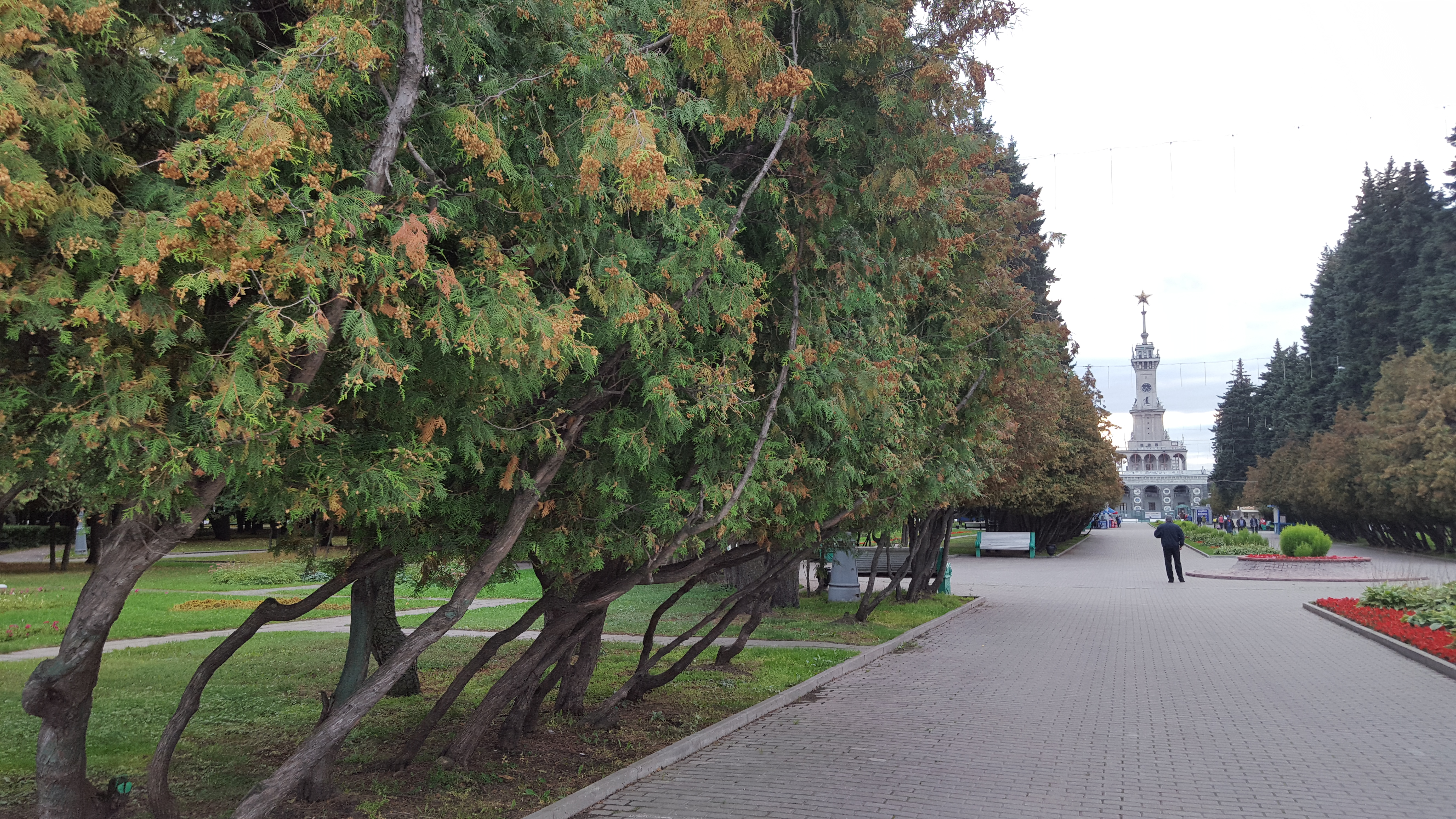 Парк Северного Речного вокзала (площадью 40,0 га): Ленинградское шоссе, Левобережный, Северный округ, Москва